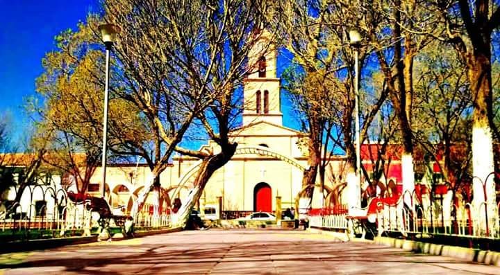 Frontis de la Iglesia de Villazón